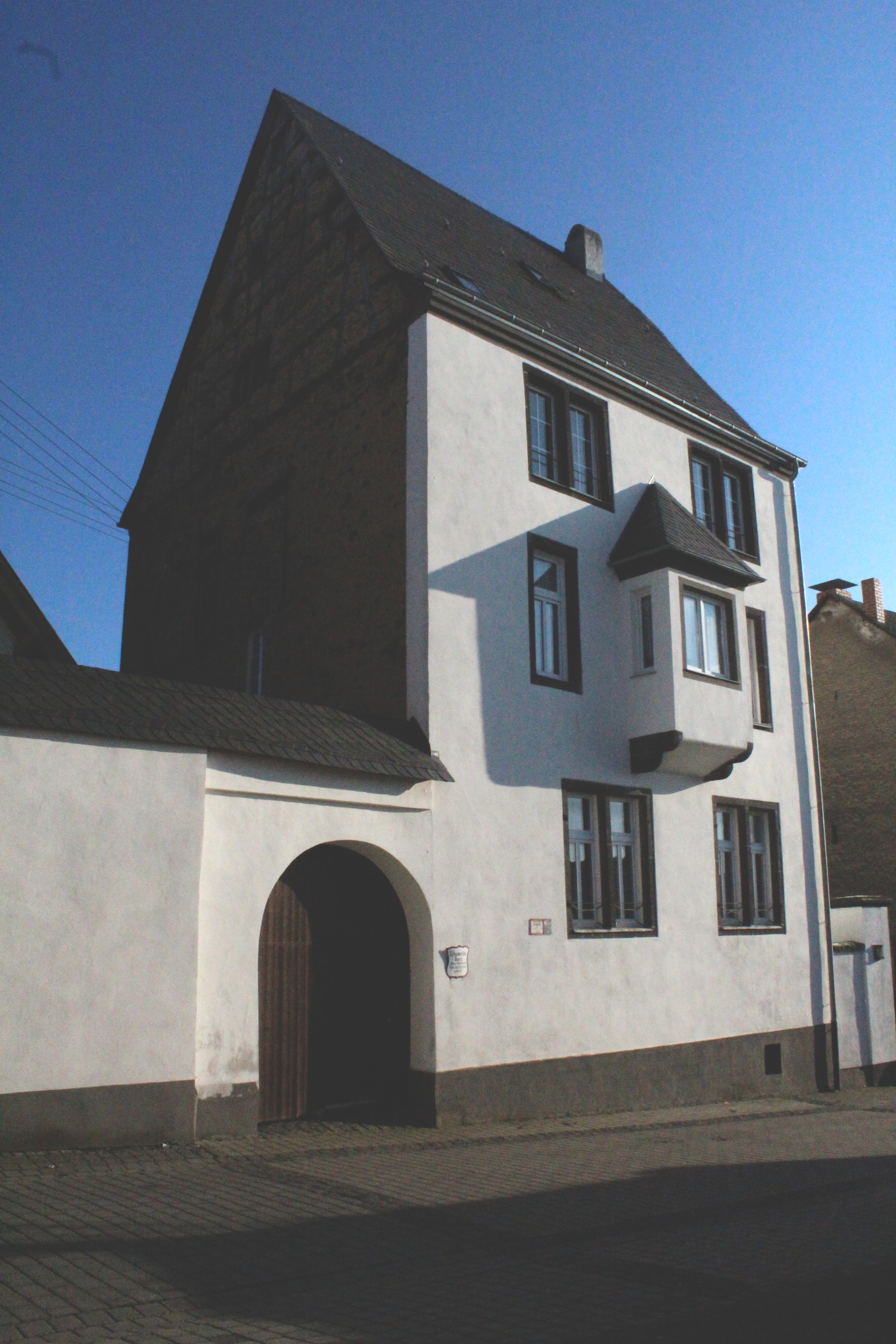 Ansicht auf die Schönecker Burg in Münstermaifeld